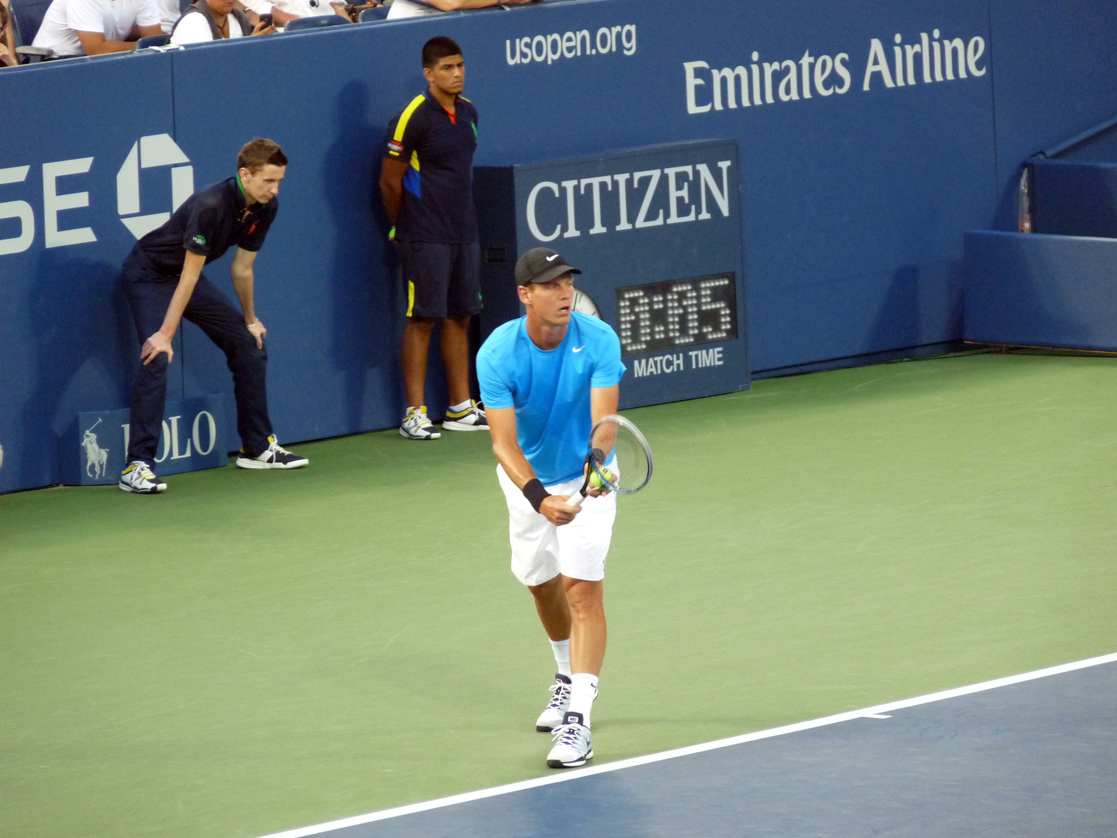 US Open 2012 Men's Singles 3rd Round (Louis Armstrong Stadium# Tomáš Berdych [6] vs. Sam Querrey [27] 6–7#6–8#, 6–4, 6–3, 6–2